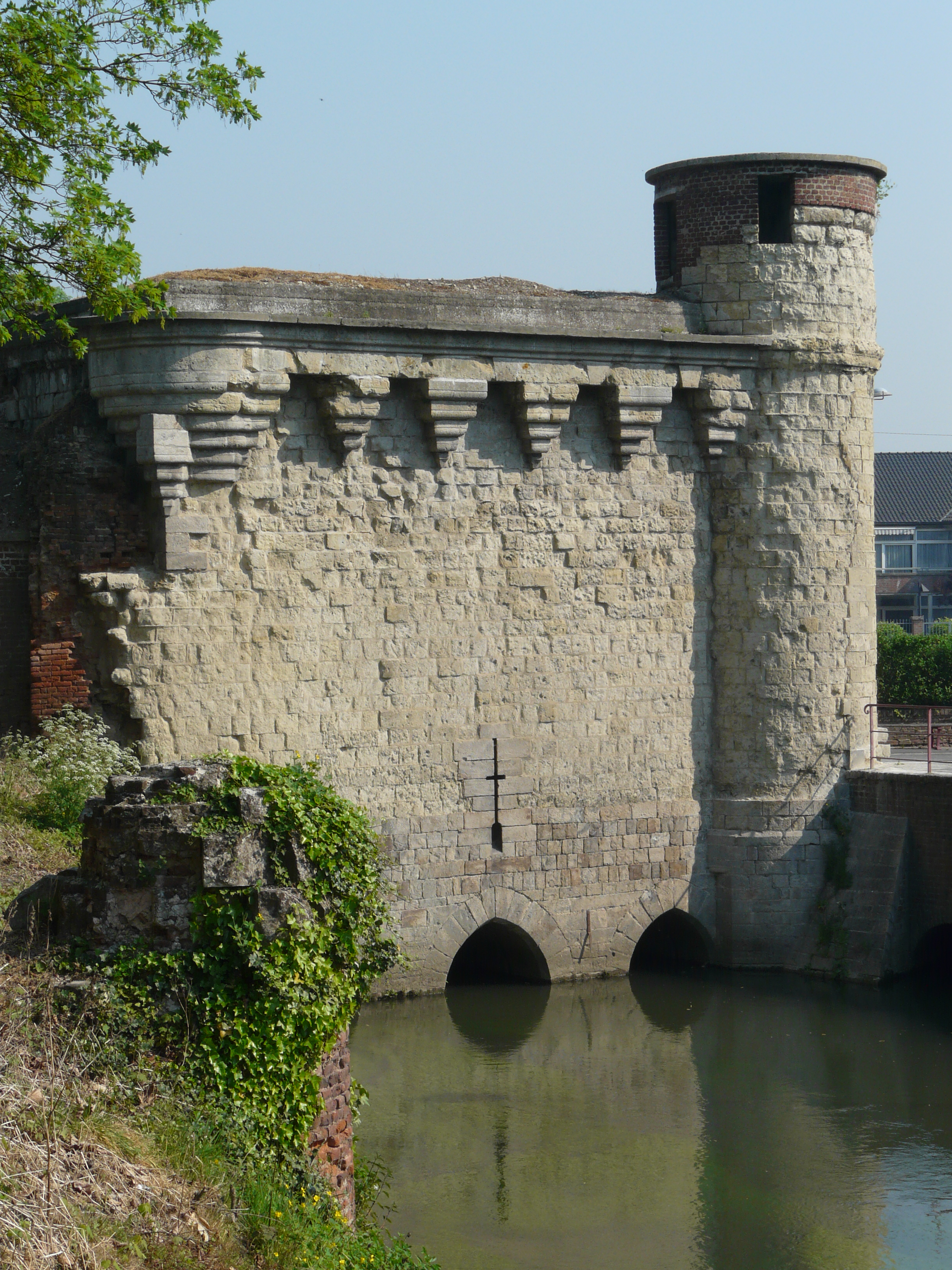 Tour des Arquets (porte d'eau) sur l'Escaut à Cambrai